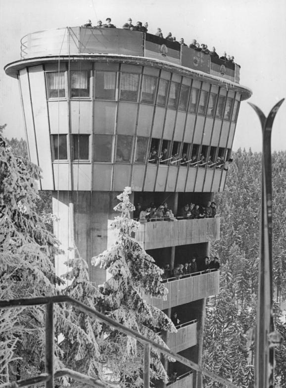 Zentralbild Kohls 22.2.1964 Nordische Skimeisterschaften in Oberhof Nach modernsten Gesichtspunkten ist der Kampfrichterturm für die Großschanze im Kanzlersgrund bei Oberhof gebaut worden. Am 21.2.1964 fand das erste Wartungsspringen der Deutschen Meisterschaft der Spezialspringer statt.